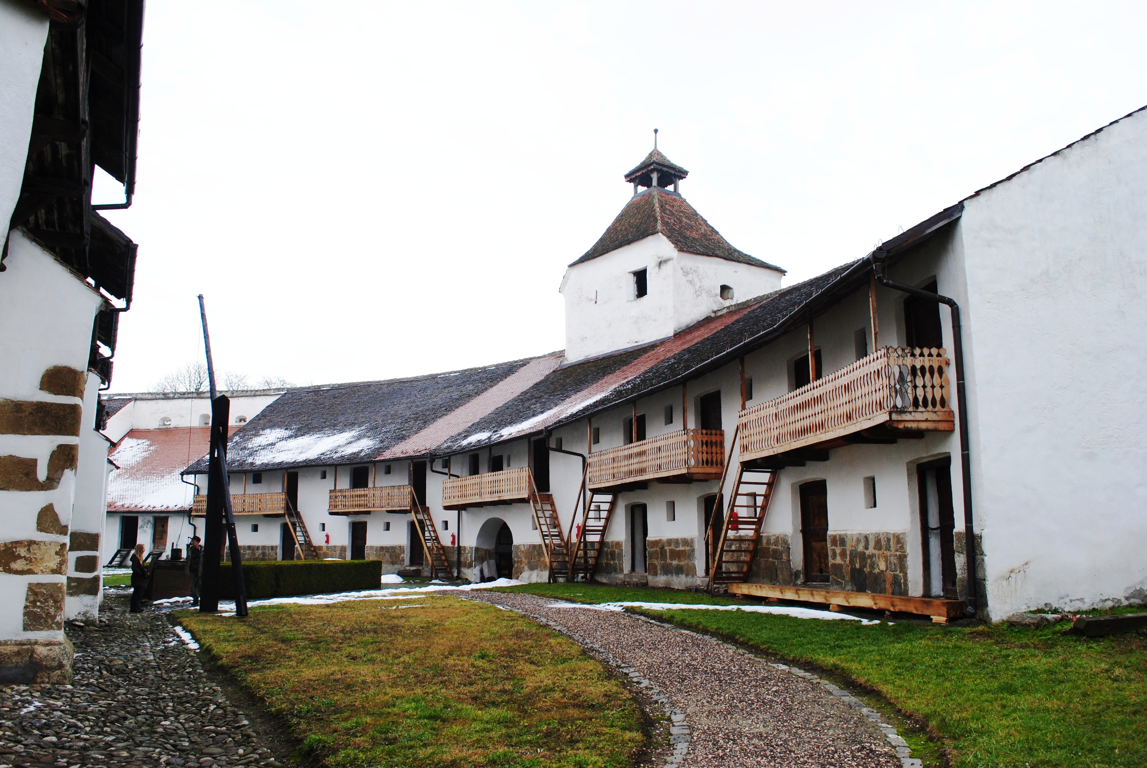 Ansamblul bisericii evanghelice fortificate, sec. XIII - XVIII